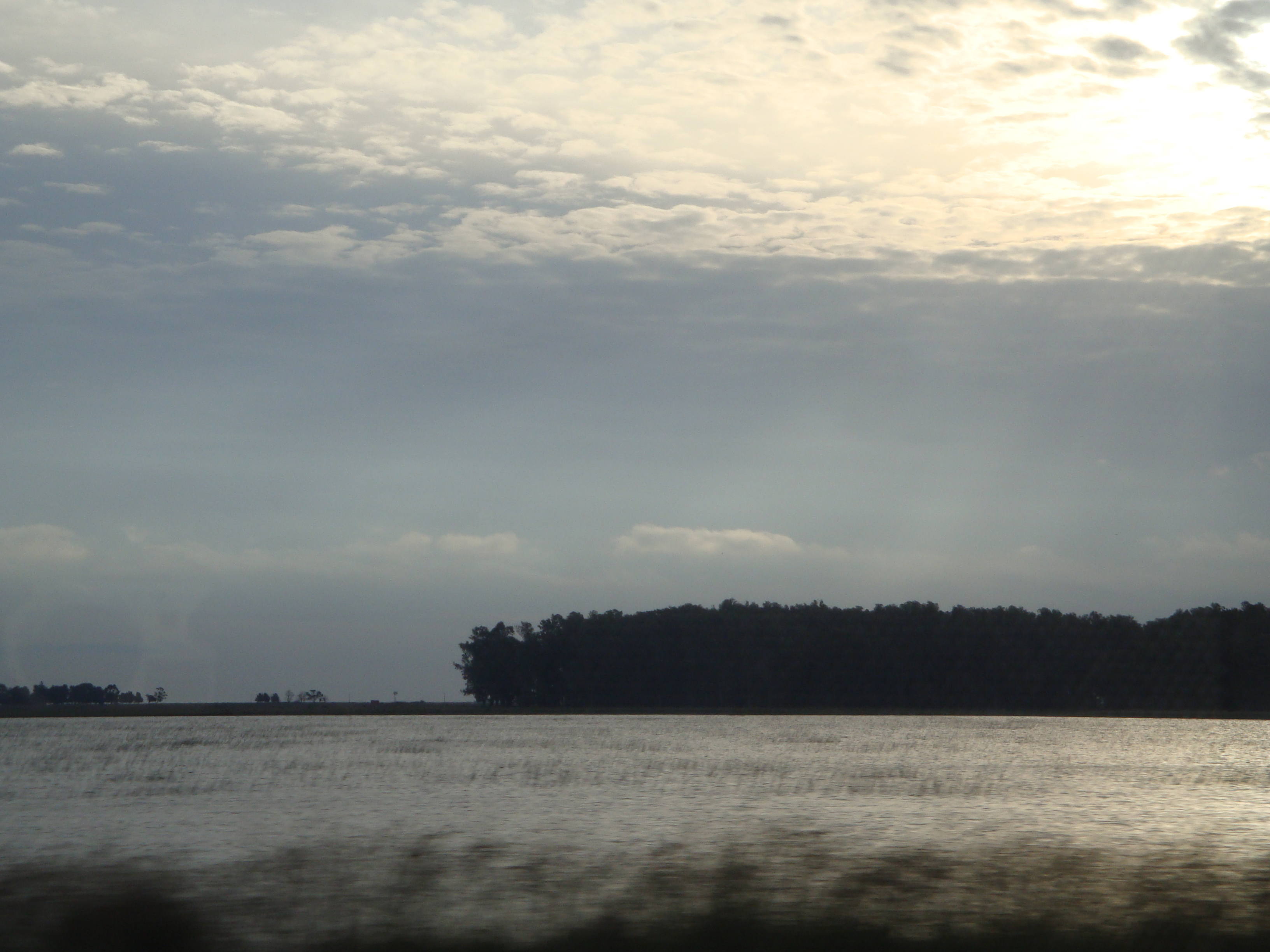 Laguna Chis Chis, Chascomús, Argentina